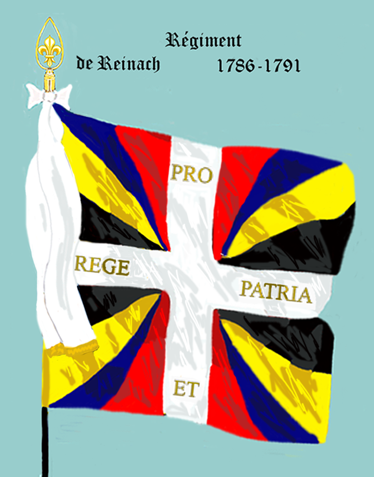 Ordonnanzfahne eines Fremdenregiments im königlich französischen Dienst. (Schweizer Regiment) - Entnommen und überarbeitet aus: „LES UNIFORMES ET LES DRAPEAUX DE L'ARMÉE DU ROI“ Marseille 1899. - Drapeau d'Ordonnance d' un régiment étranger au service française (régiment suisse.)